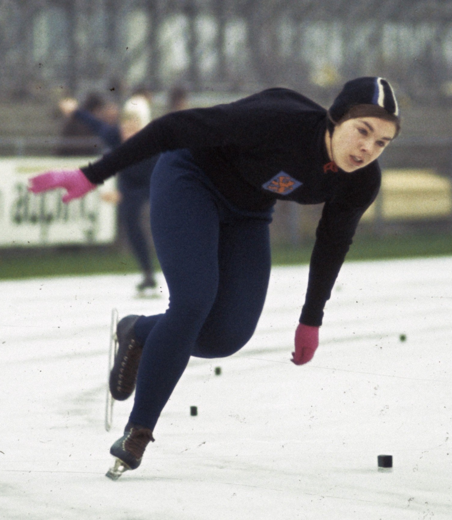 Schaatswedstrijden om de IJsselcup in Deventer. Elly van den Brom in aktie.